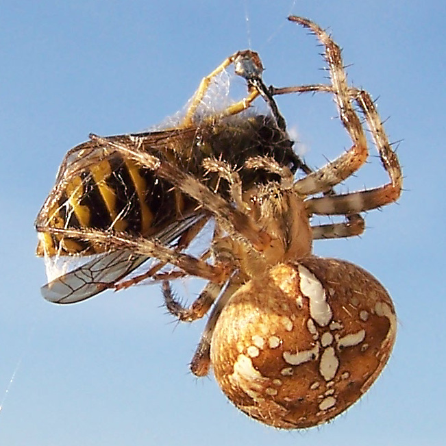 Araneus diadematus (Gartenkreuzspinne mit Wespe), cutout 651x651px Aufnahme Daten Kamera Kodak V550 Optik Schneider-Kreuznach C-Variogon 36-108 Blitz nein Brennweite 36 mm Blende F 4,4 Verschlusszeit 1/388 s ISO-Wert 80 Lichtquelle Tageslicht, Sonne von links Abstands-Bereich Macro Bildauflösung 2576x1932 For more translations SEE BELOW